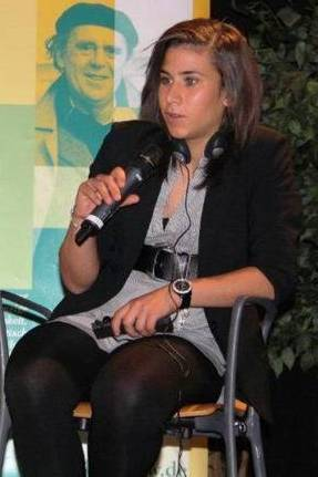 Hasret Kayikci (U23 Nationalspielerin aus Rohrbach, jetzt bei FCR 2001 Duisburg in der 1. Bundesliga) Foto: Annette Goerlich